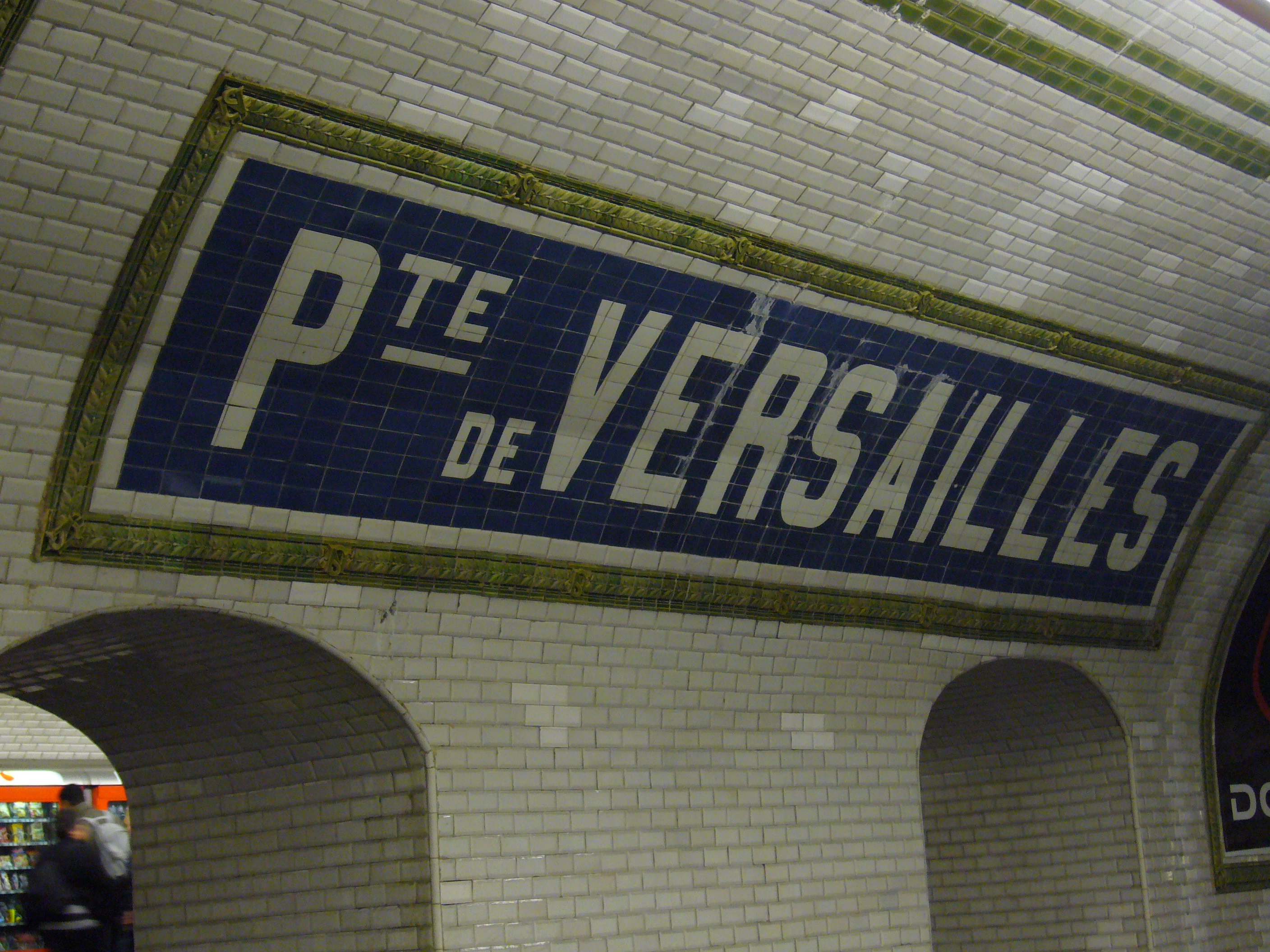 Vue du nom en faïence typique Nord Sud de la station Porte de Versailles sur la ligne 12 du métro de Paris.